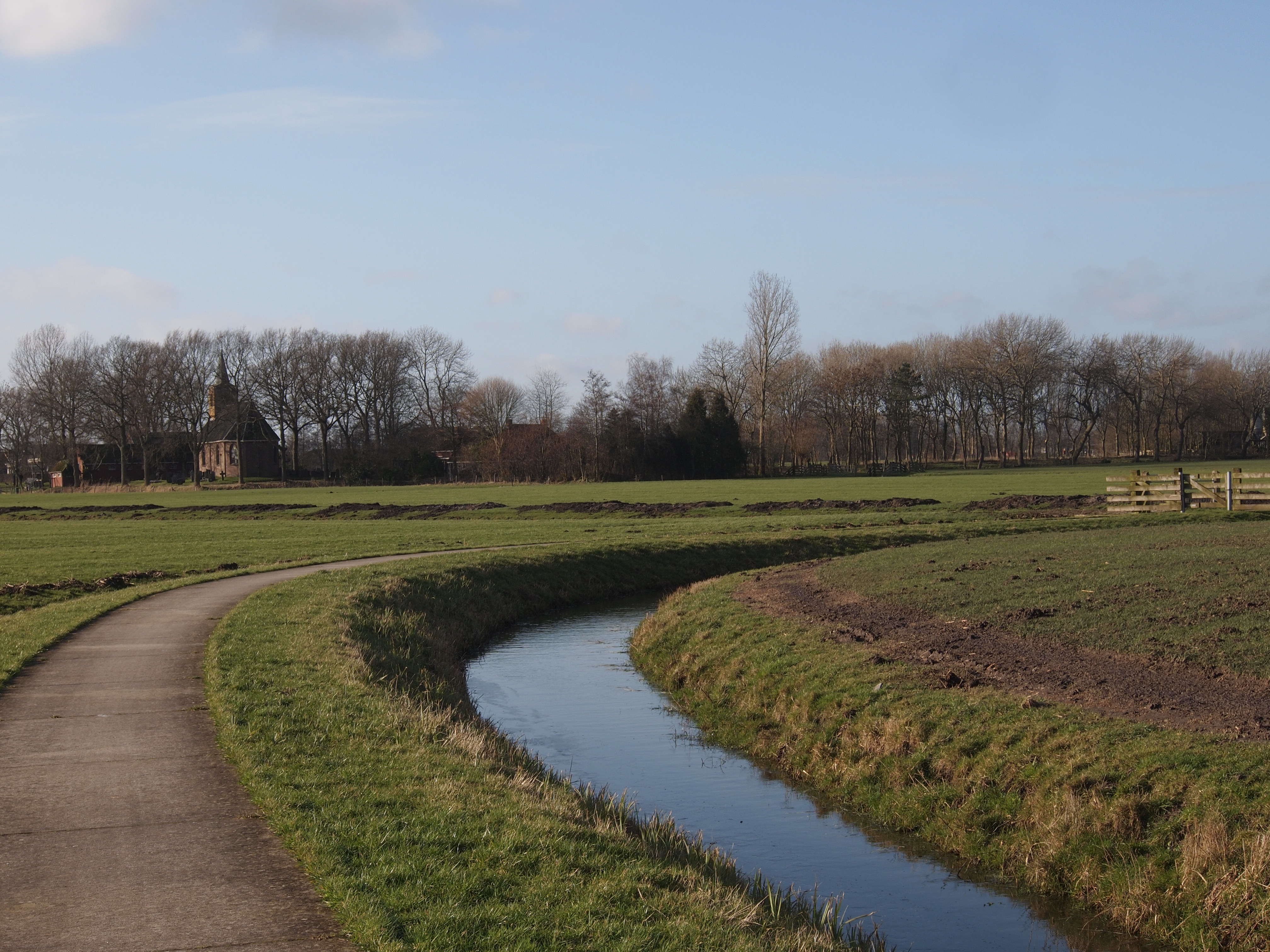 Augsbuurt. De Lijkweg naar het Kerkje